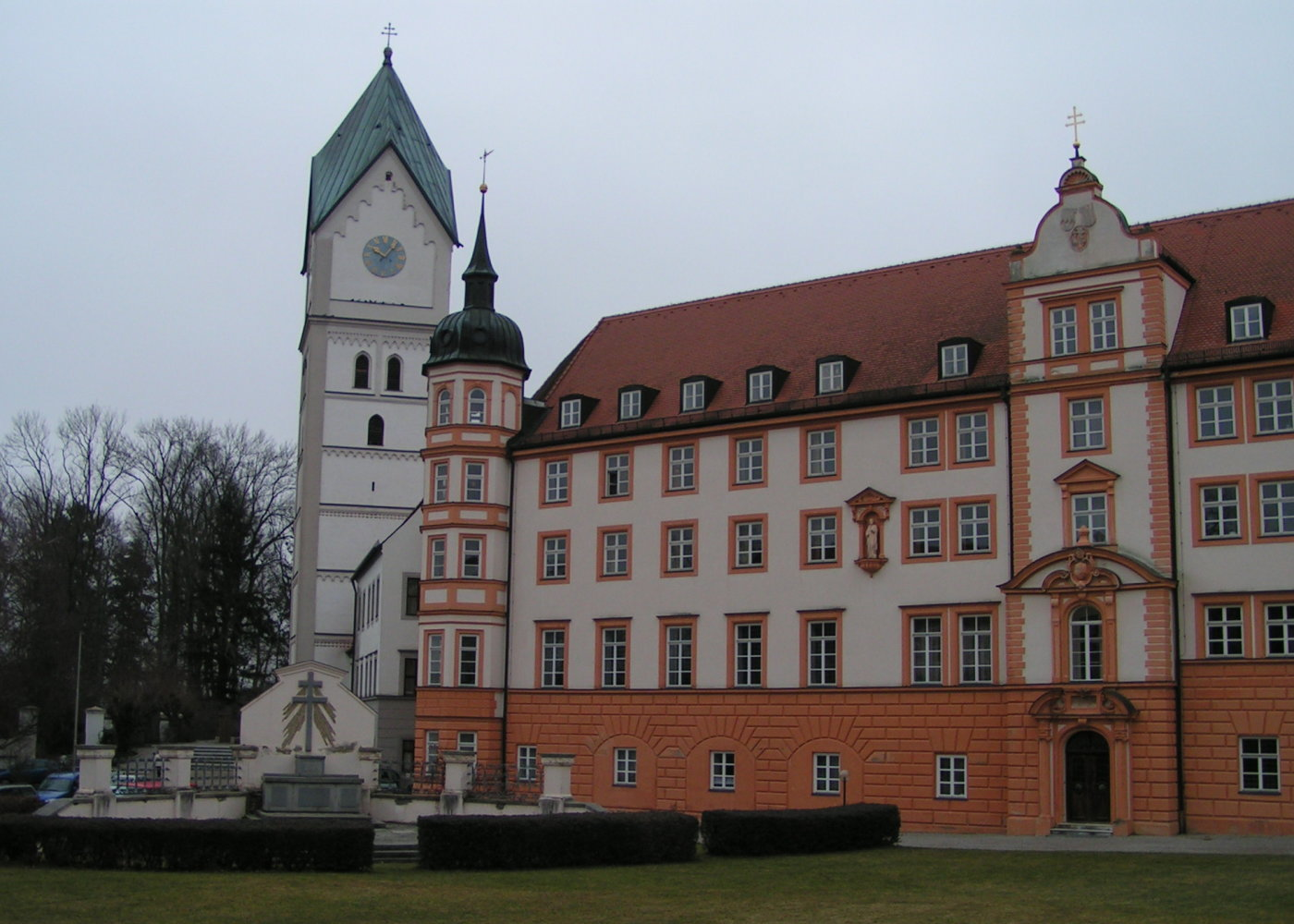 Kloster Scheyern